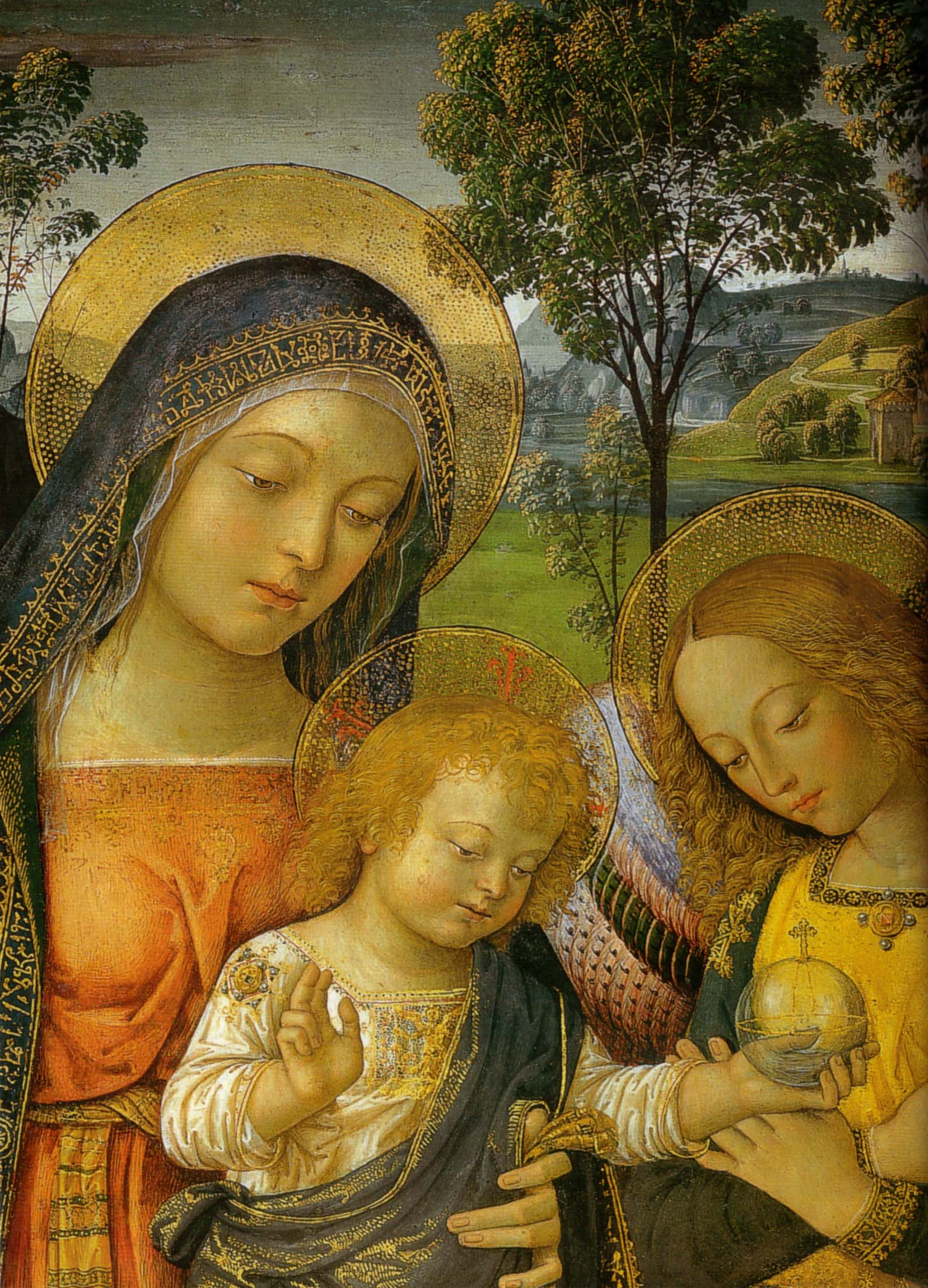 Pinturicchio, madonna della pace, 1490 circa. 143x70 cm, sanseverino marche, pinacoteca civica, dettaglio